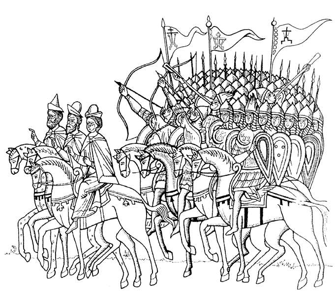 Княжа дружина. Новгородська дружина виступає проти суздальців (13 століття).